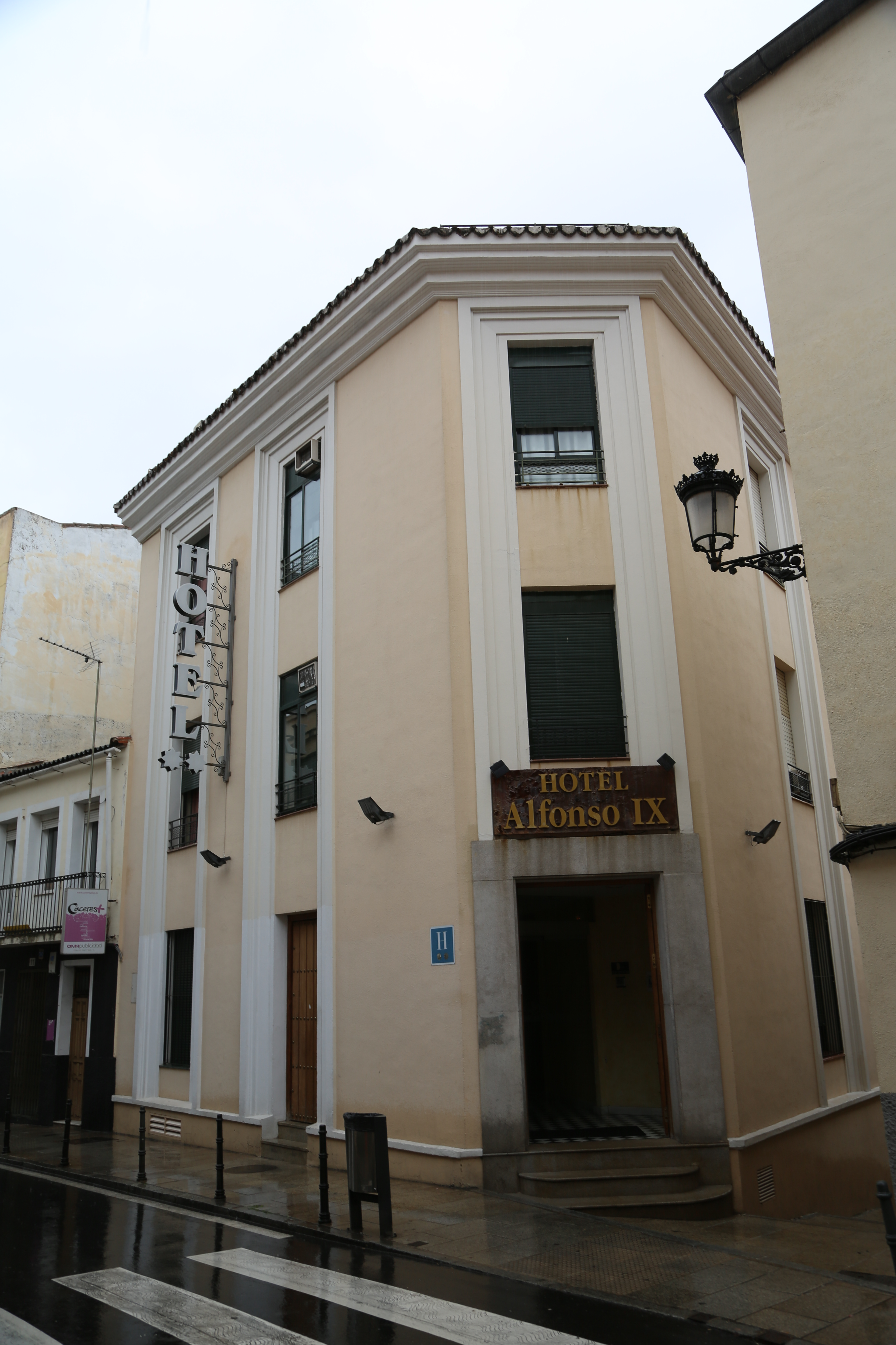 Hotel Alfonso IX, originalmente llamado Hotel Álvarez. Cáceres.